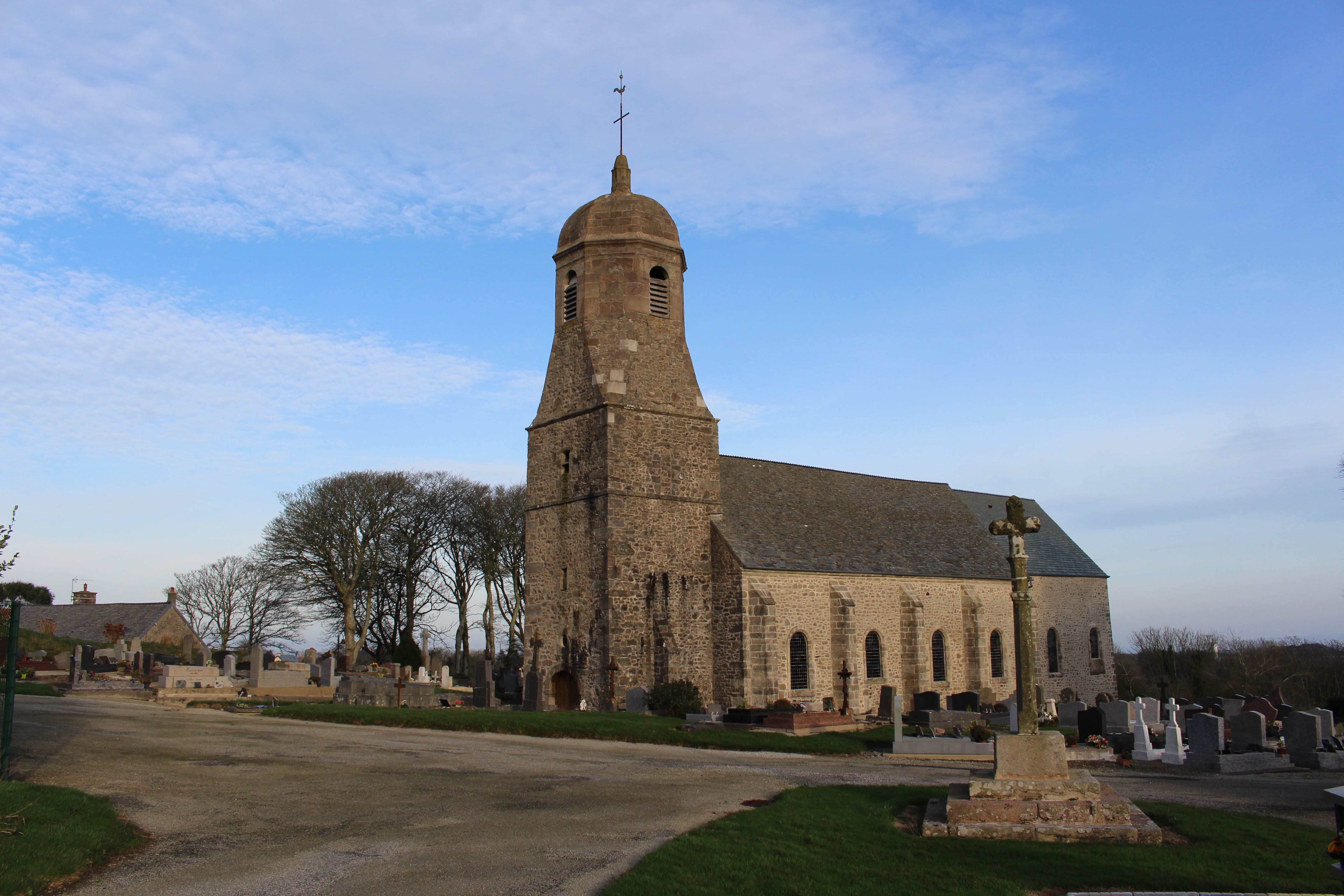 Sainte-Croix-Hague, Manche